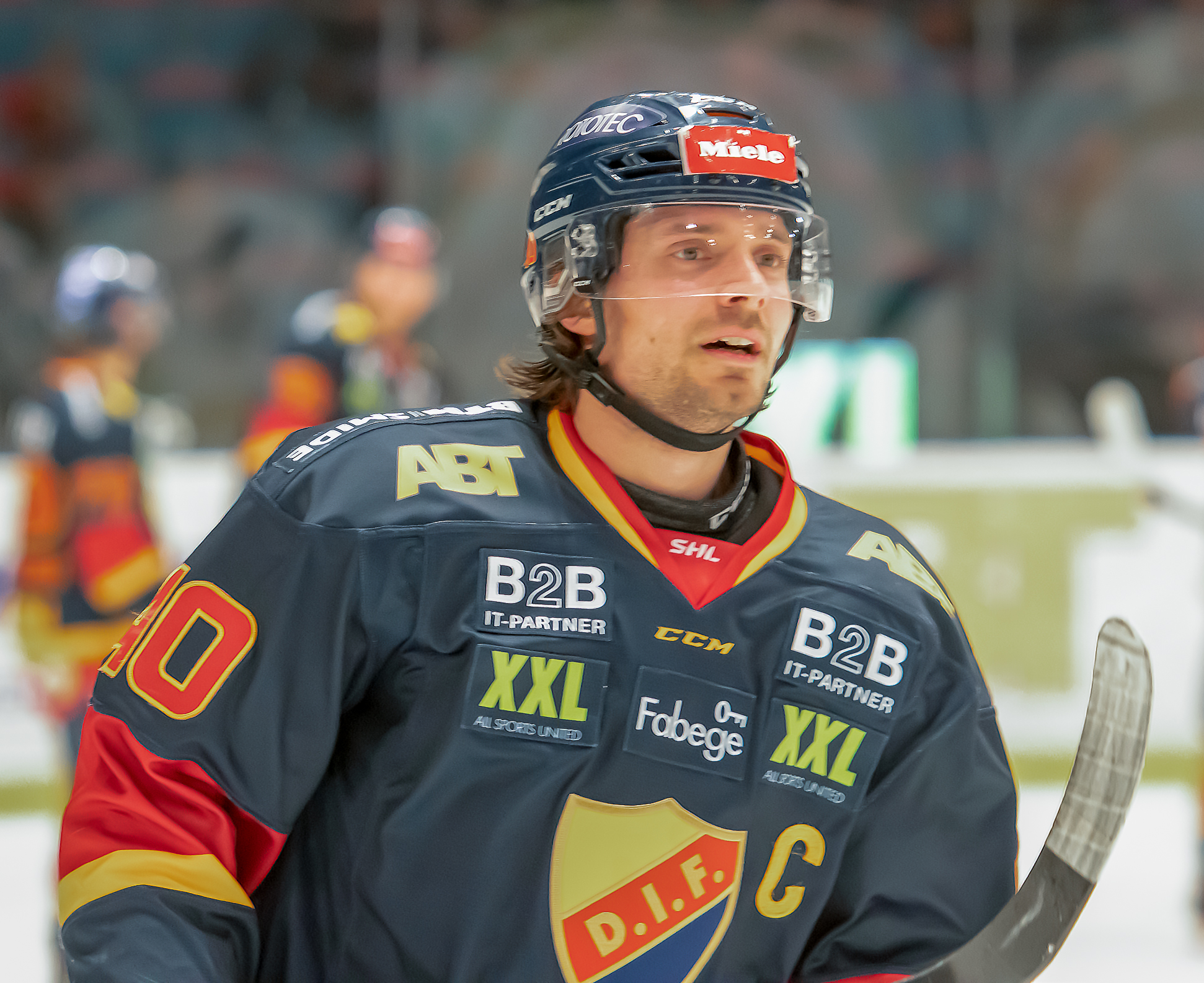 Djurgården-Färjestad 20190129